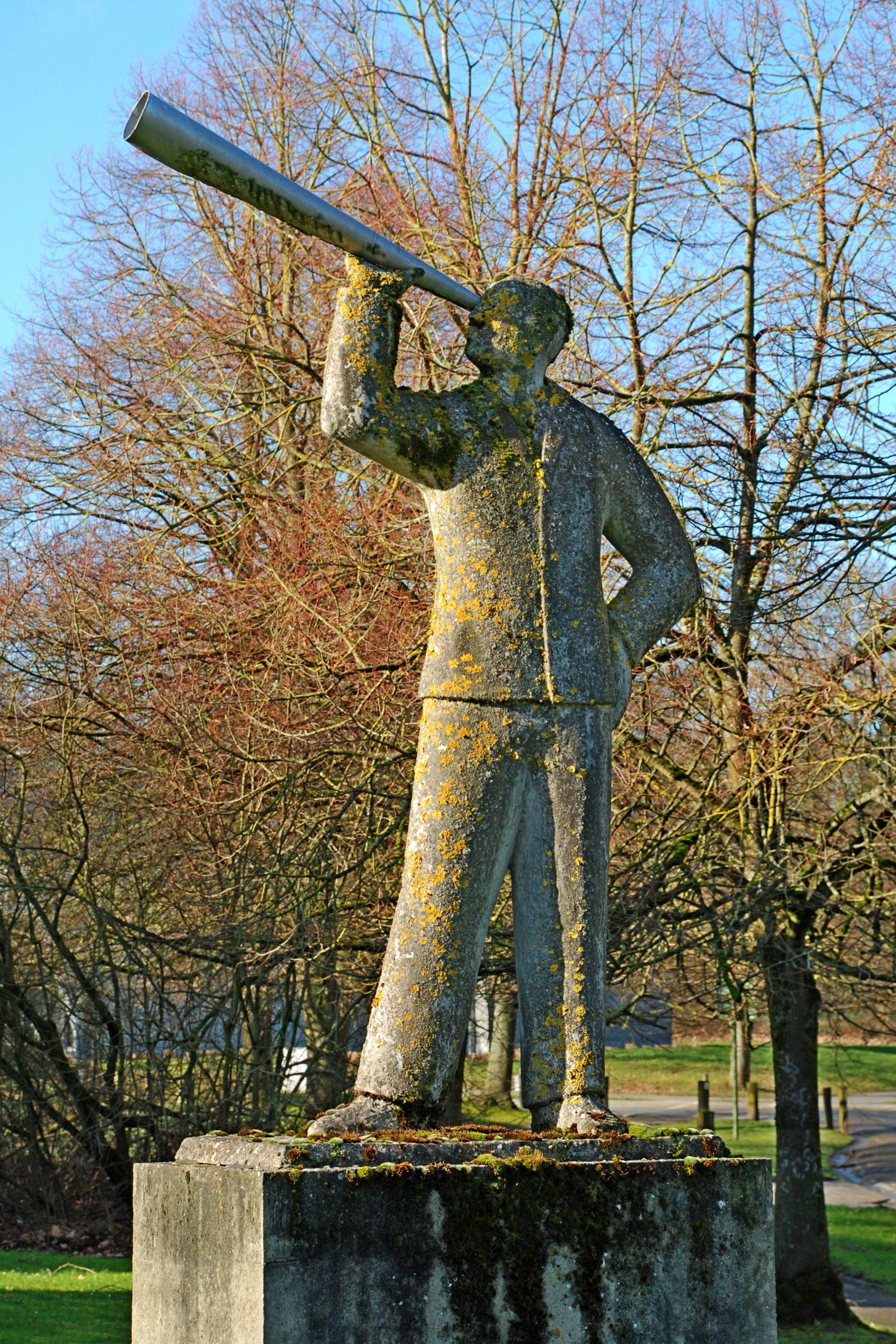 Belgique - Louvain-la-Neuve - À la recherche de l'étoile perdue ou Scrutateur d'étoiles (Philip Aguirre y Otegui 2006)